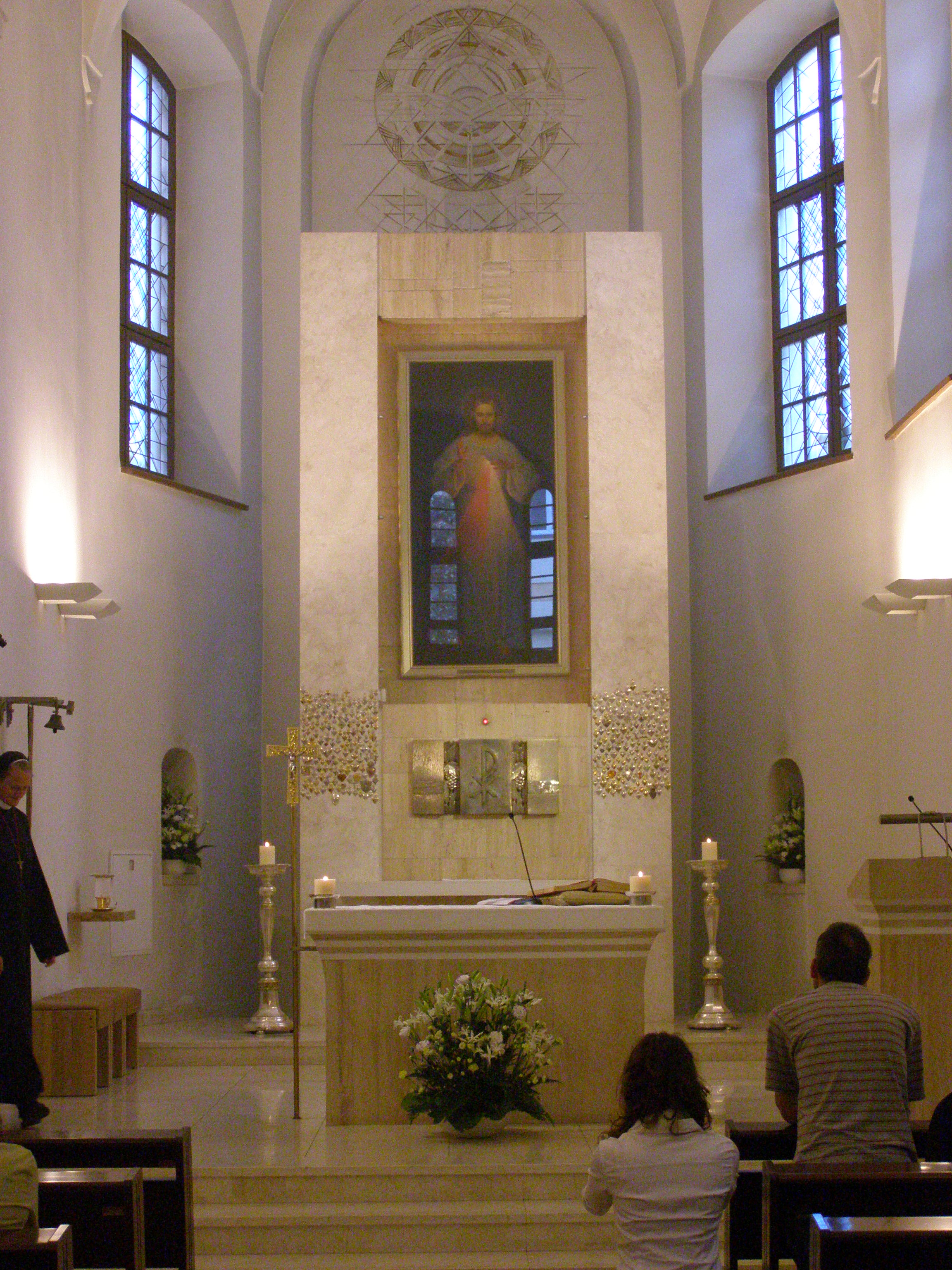 Pierwszy obraz Jezusa Miłosiernego - Kościół św. Trójcy w Wilnie